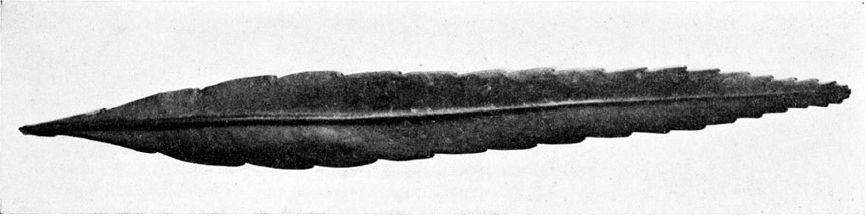 Pseudorhipsalis himantoclada (Hylocereeae; Cactaceae; Planta) Nathaniel Lord Britton és Joseph Nelson Rose "The Cactaceae" c. könyvéből